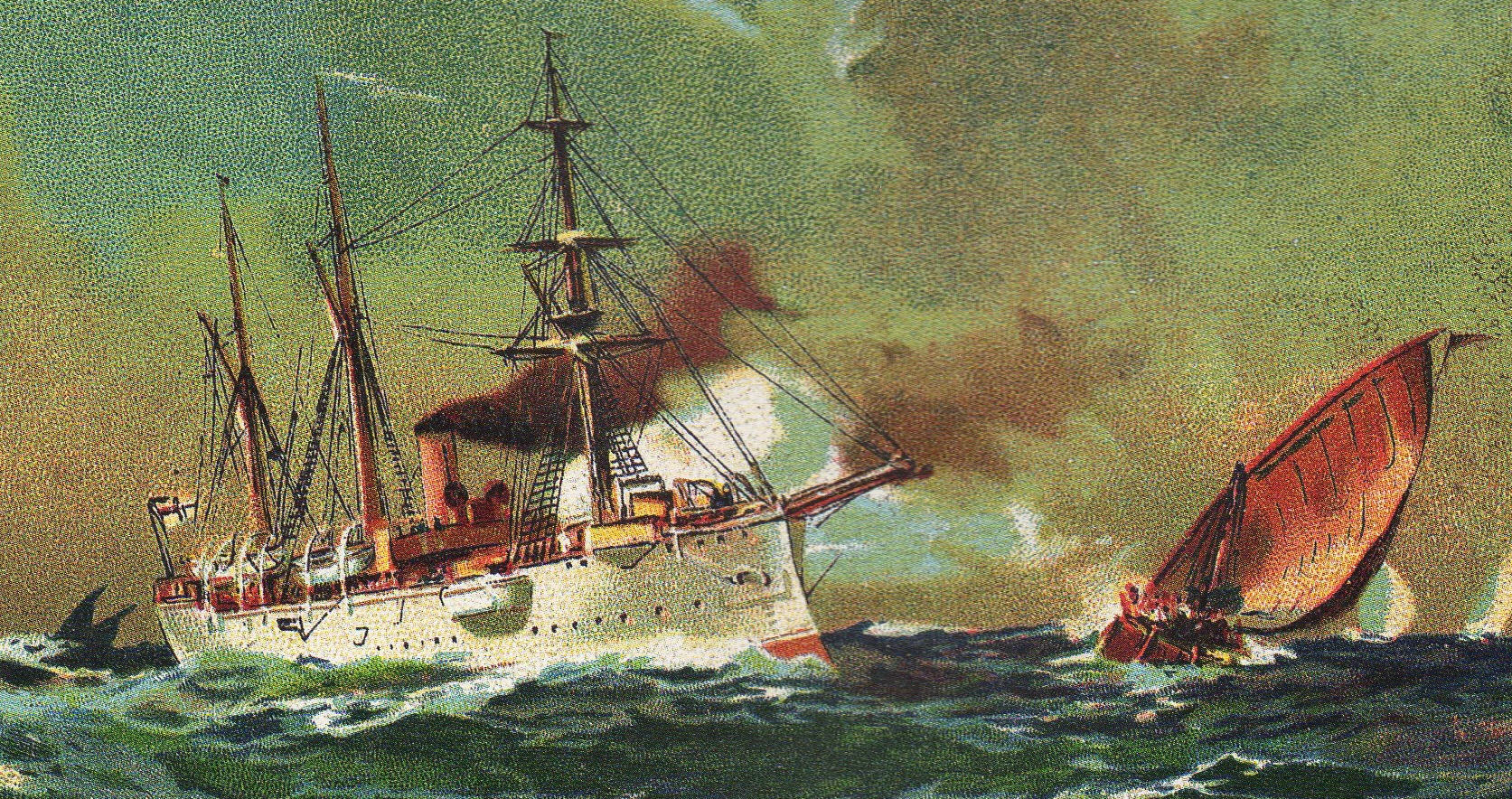 Kreuzer IV. Kl. "Schwalbe" verfolgt an der ostafrikanischen Küste eine Dhau (Sklavenhändler), 1889. Ausschnitt